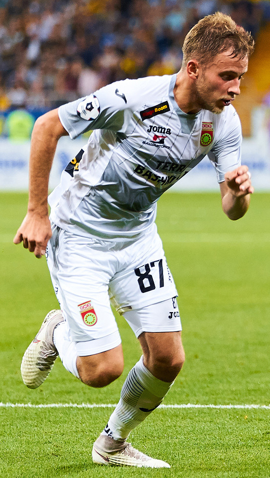 «Ростов» и «Уфа» не смогли размочить счет на табло в матче 8-го тура РПЛ